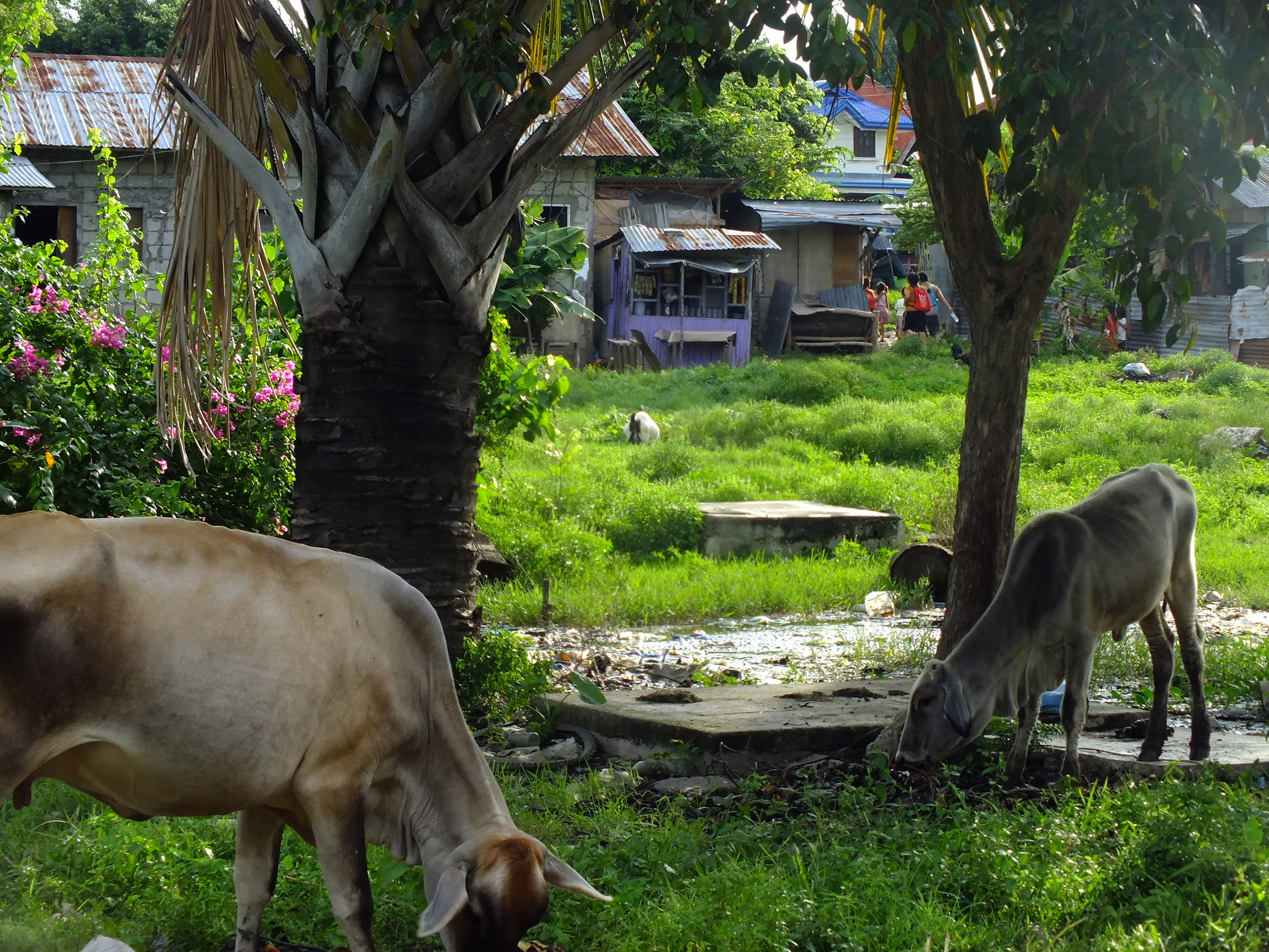 Buaya, Lapu-Lapu City, Cebu, Philippines